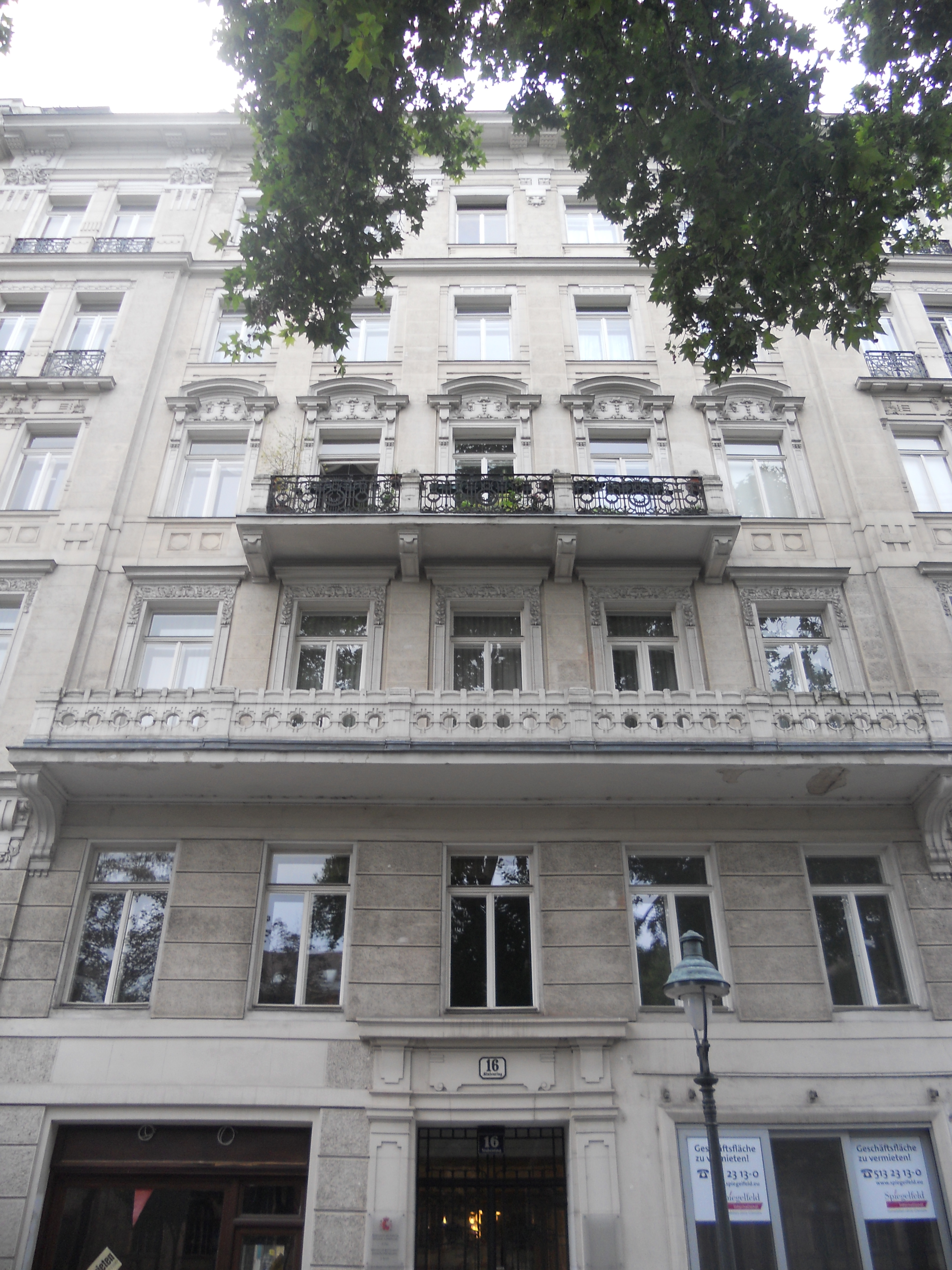 Haus Stubenring 16 in Wien, erbaut 1904 von Johann Eustacchio